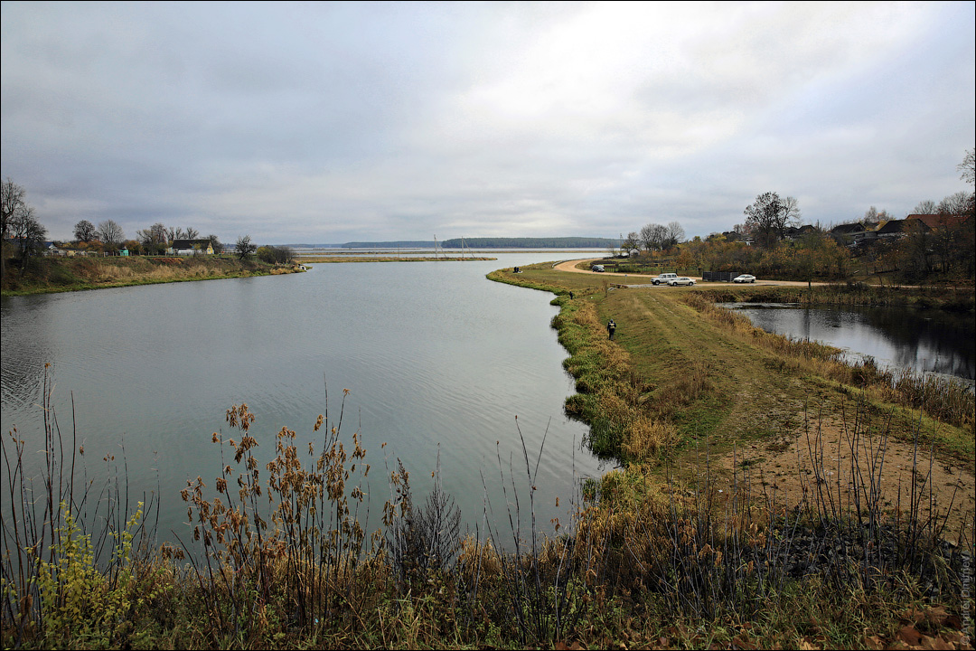 Свіслач. Рака Свіслач